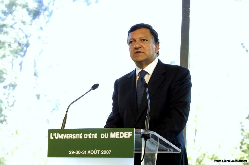 José Manuel Barroso